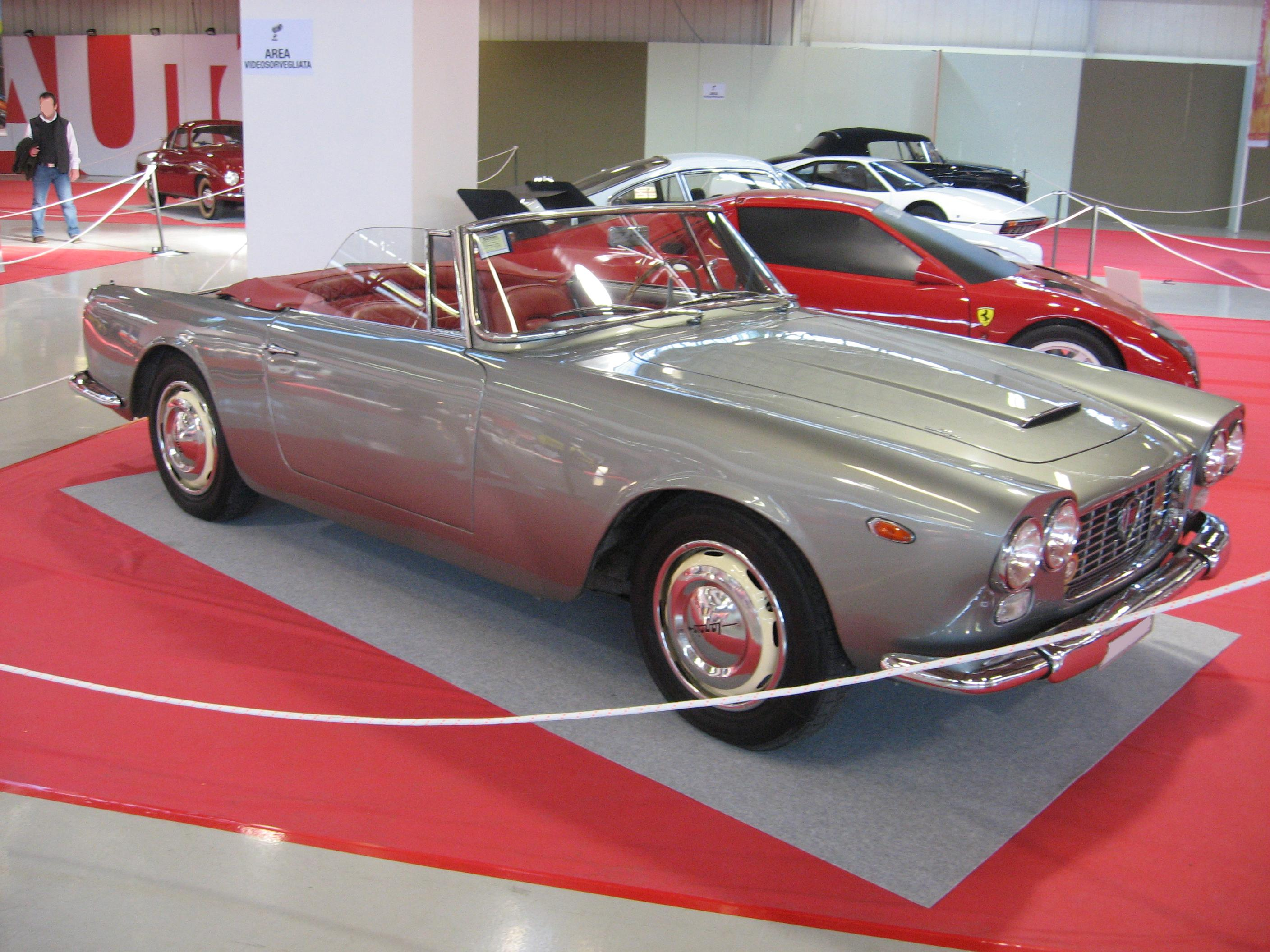 Subject